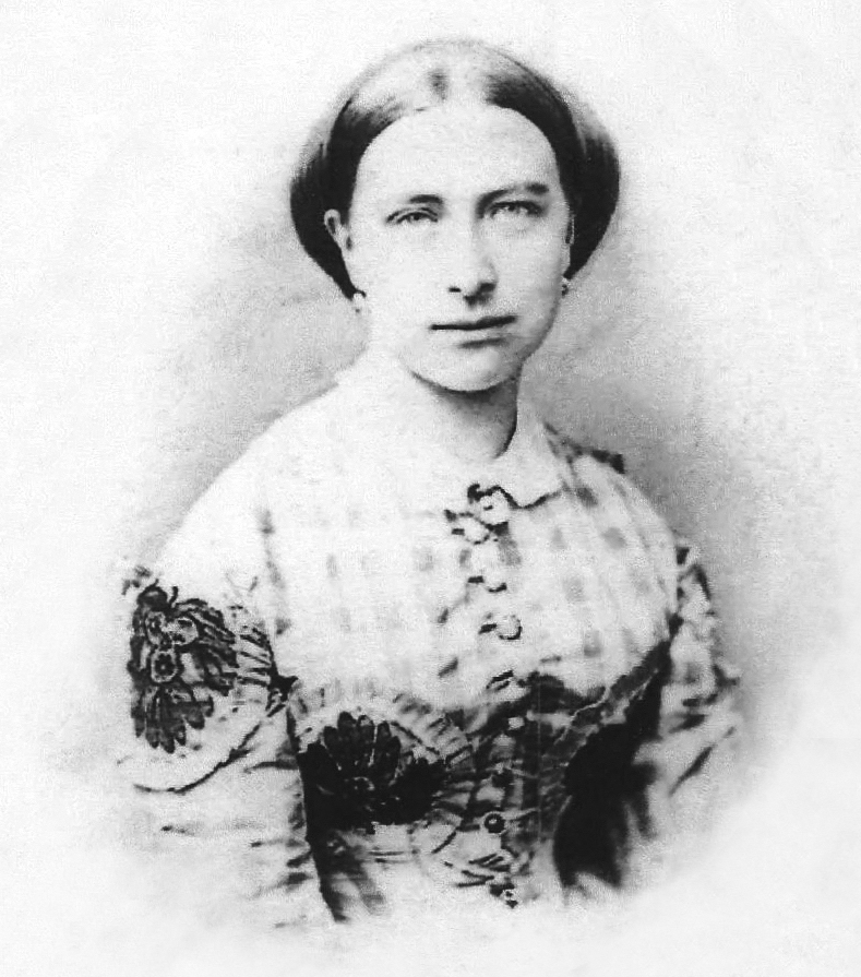 Porträtfotografie von Auguste Reuß zu Köstritz